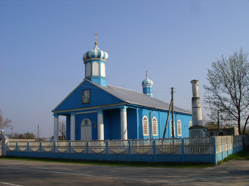 Беларуская (тарашкевіца): Царква ў Антопалі